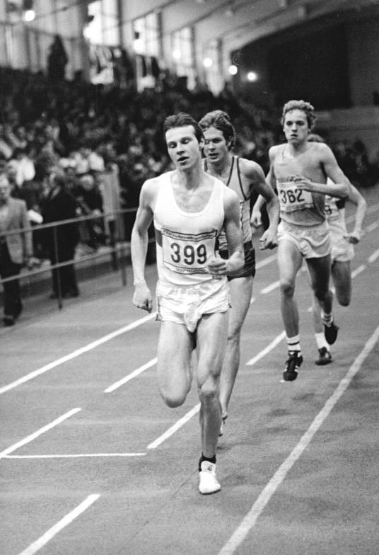 Hans-Joachim Mogalle ADN-ZB Reiche 15.2.81 Senftenberg: Leichtathletik-Wettkämpfe- Über 800 m der Männer wurden die beiden Olympiafinalisten Andreas Busse und Detlef Wagenknecht überraschend von Hans-Joachim Mogalle hier beim Vorlauf (Nr. 399) , vom SC Chemie Halle, auf der Zielgeraden überspurtet.